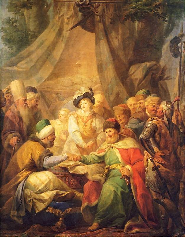 Traktat chocimski 1782-1783. Olej na płótnie. Muzeum Narodowe w Warszawie.